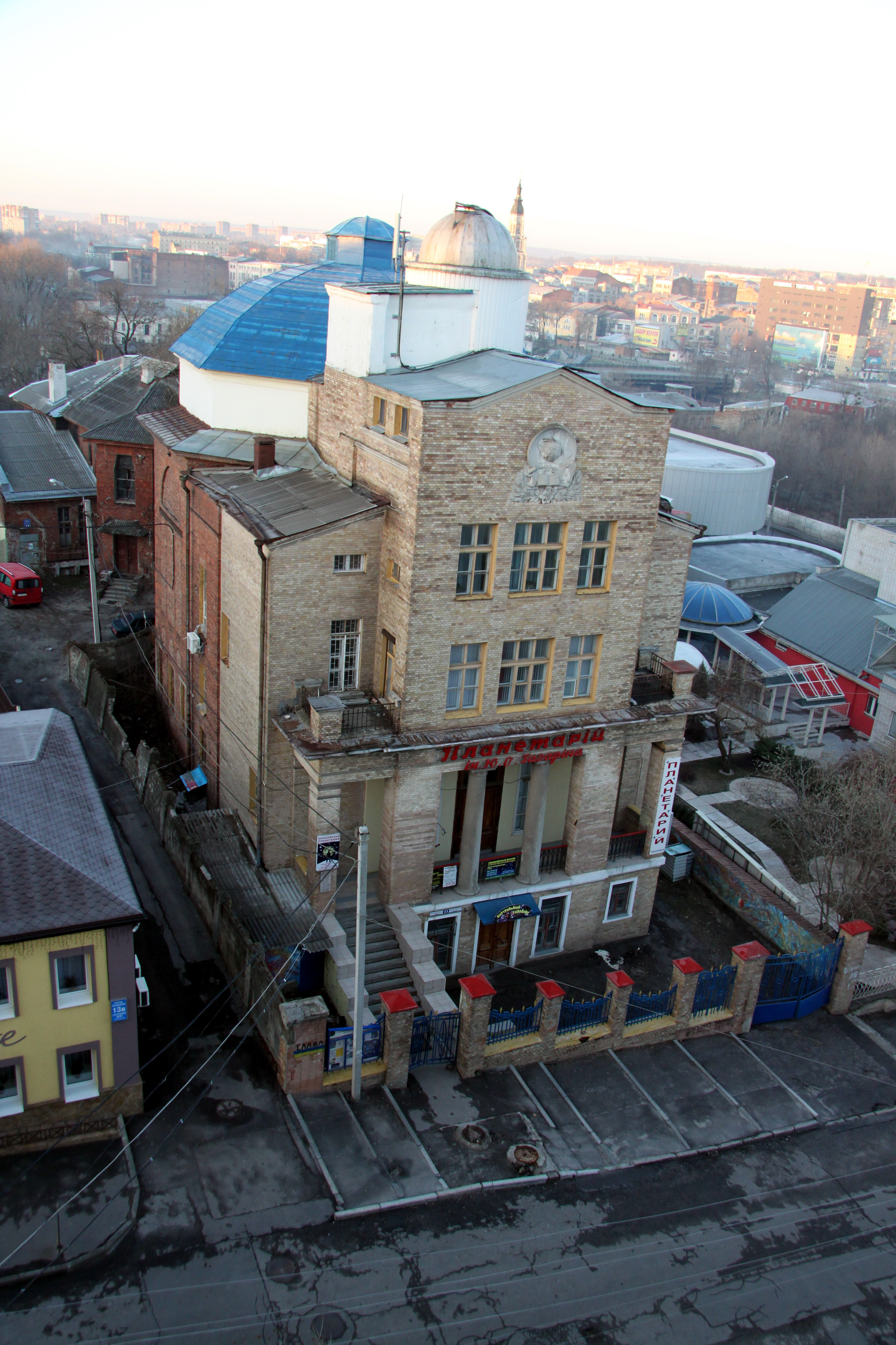 Планетарій, пров. Кравцова, 15, Харків